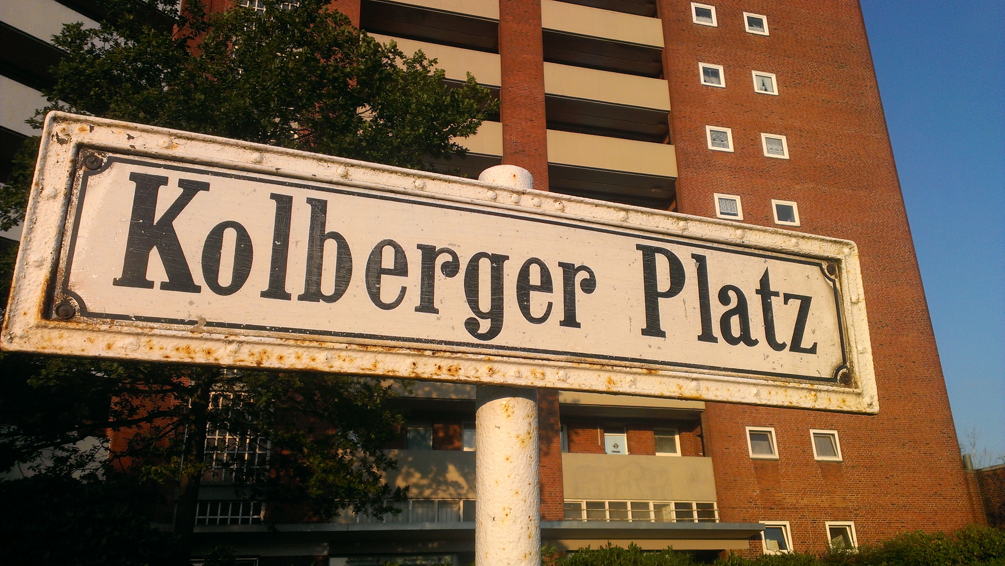 Straßenschild in Lübeck "Kolberger Platz"